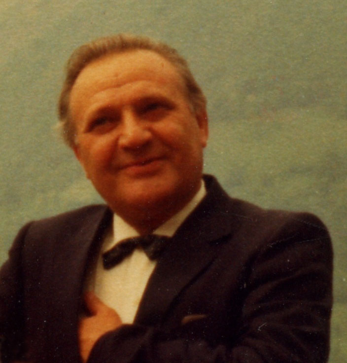 foto del poeta